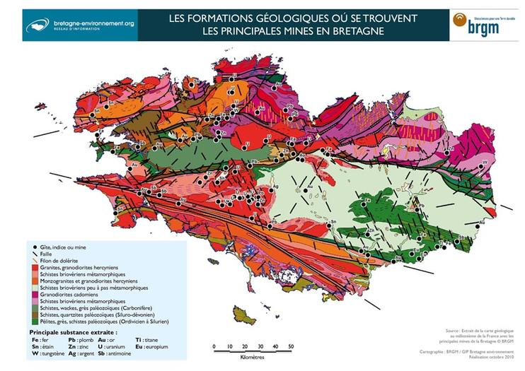 mines de bretagne, géologie de la bretagne